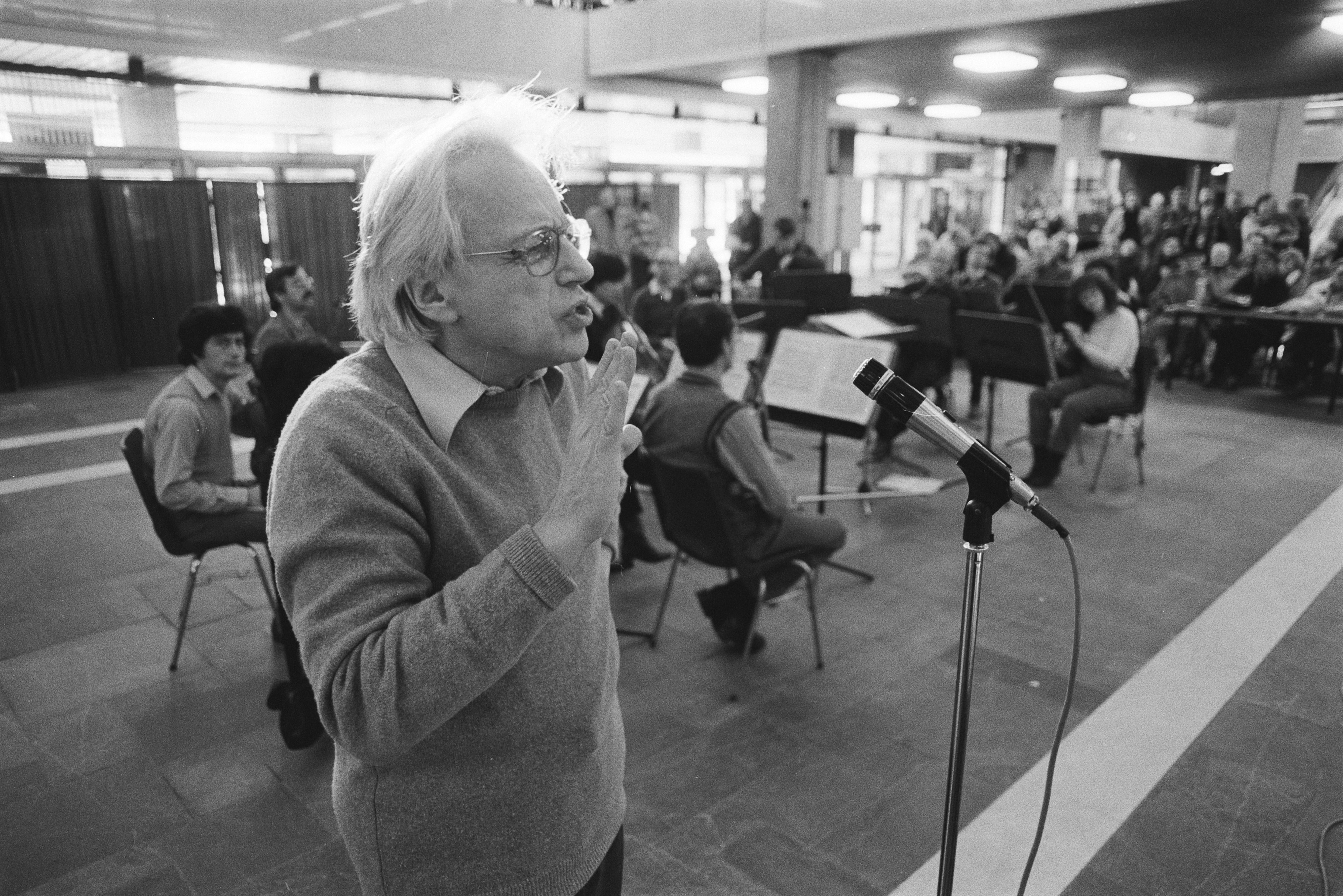 Collectie / Archief : Fotocollectie Anefo Reportage / Serie : [ onbekend ] Beschrijving : Compnist Gyorgy Ligeti , tijdens repetitie Datum : 1 februari 1984 Trefwoorden : componisten, repetities Persoonsnaam : Gyorgy Ligeti Fotograaf : Antonisse, Marcel / Anefo Auteursrechthebbende : Nationaal Archief Materiaalsoort : Negatief (zwart/wit) Nummer archiefinventaris : bekijk toegang 2.24.01.05 Bestanddeelnummer : 932-8518